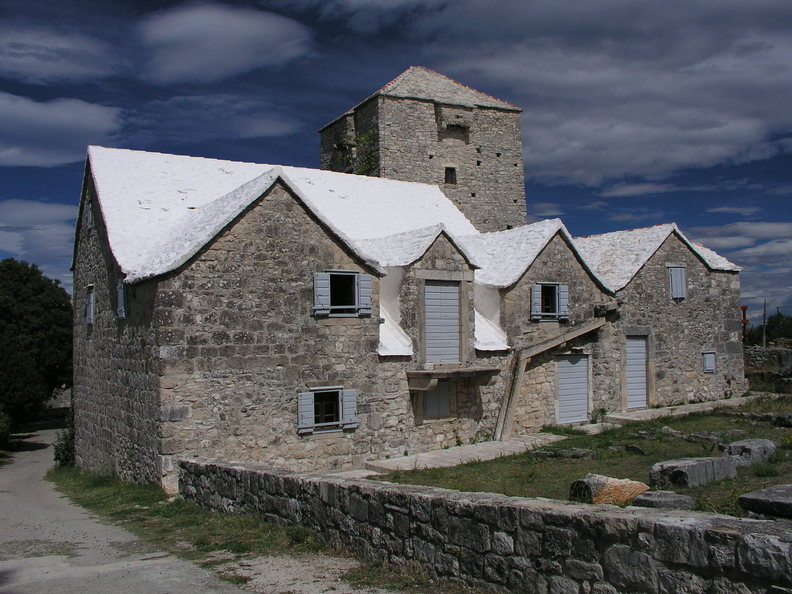 Škrip